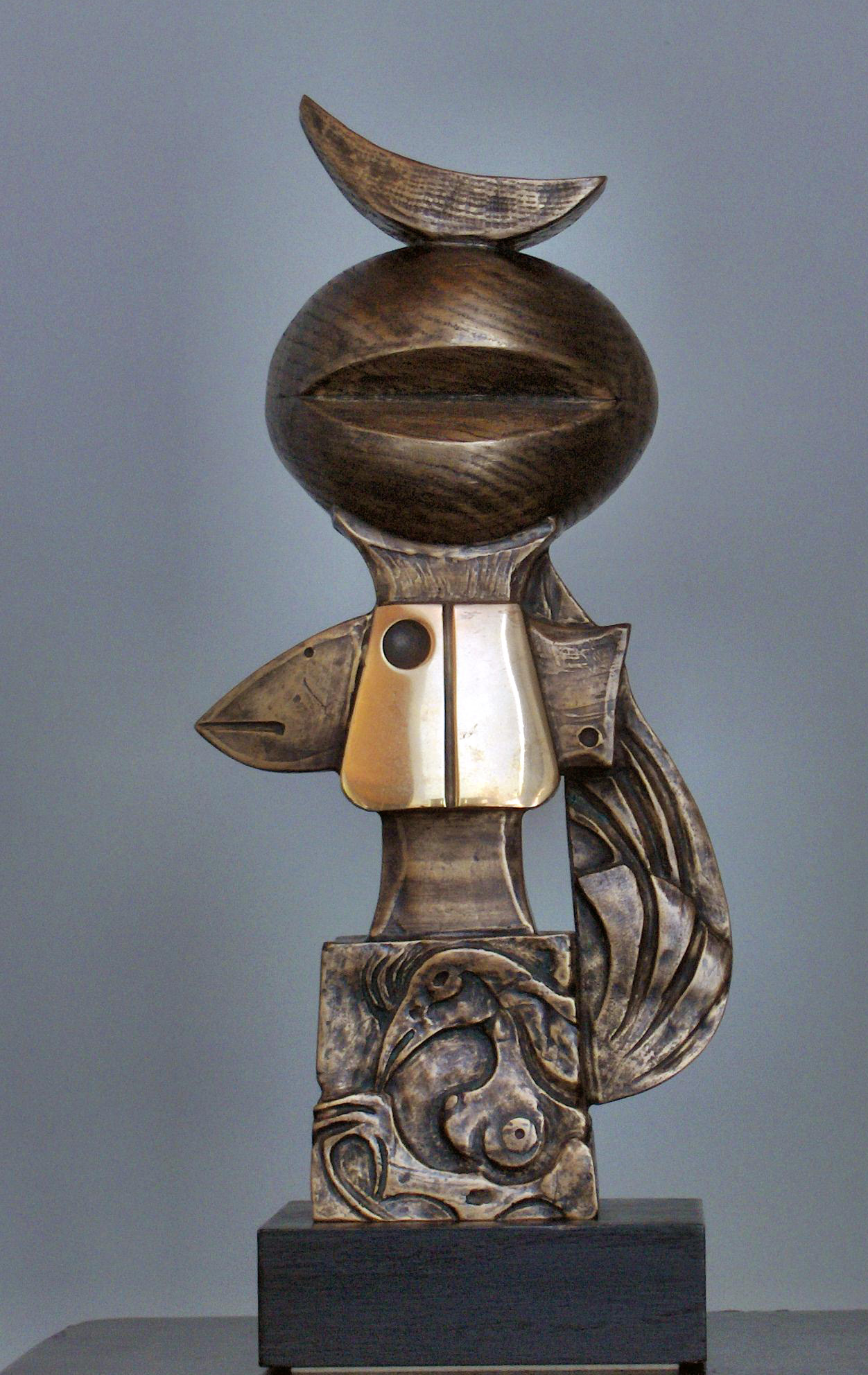 Bronzen beeld "All together" Willy Bosschem (onderste gedeelte) samen met Hubert Minnebo (middelste gedeelte) en Jacky De Maeyer (bovenaan) 1999